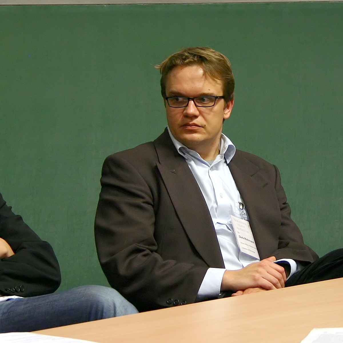 Wikipedia trifft Altertum - Dirk Rohmann